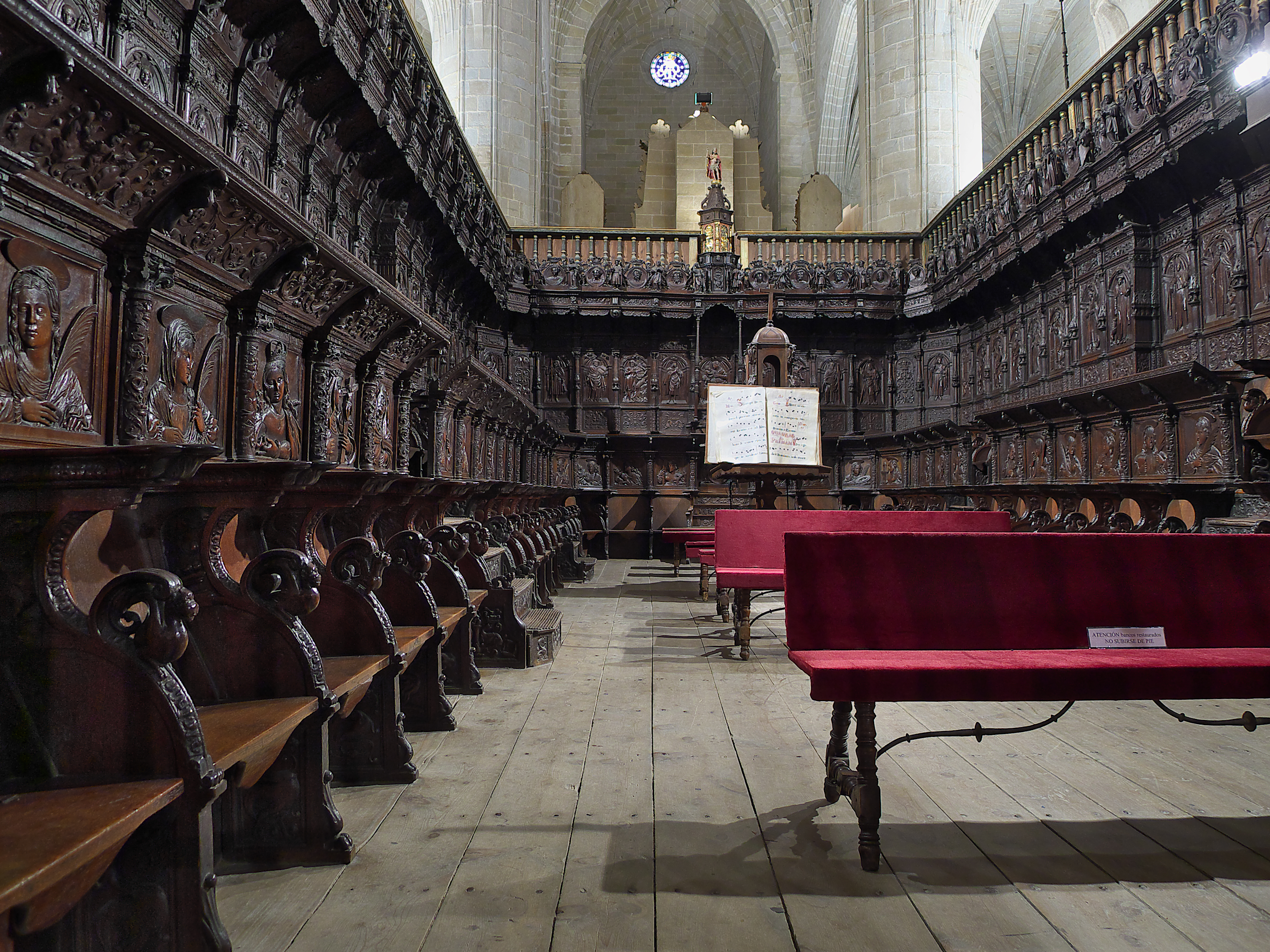 Guillén de Holanda, con la colaboración de Manuel Borgoñon, talla la sillería del coro en madera de nogal (ca. 1526)